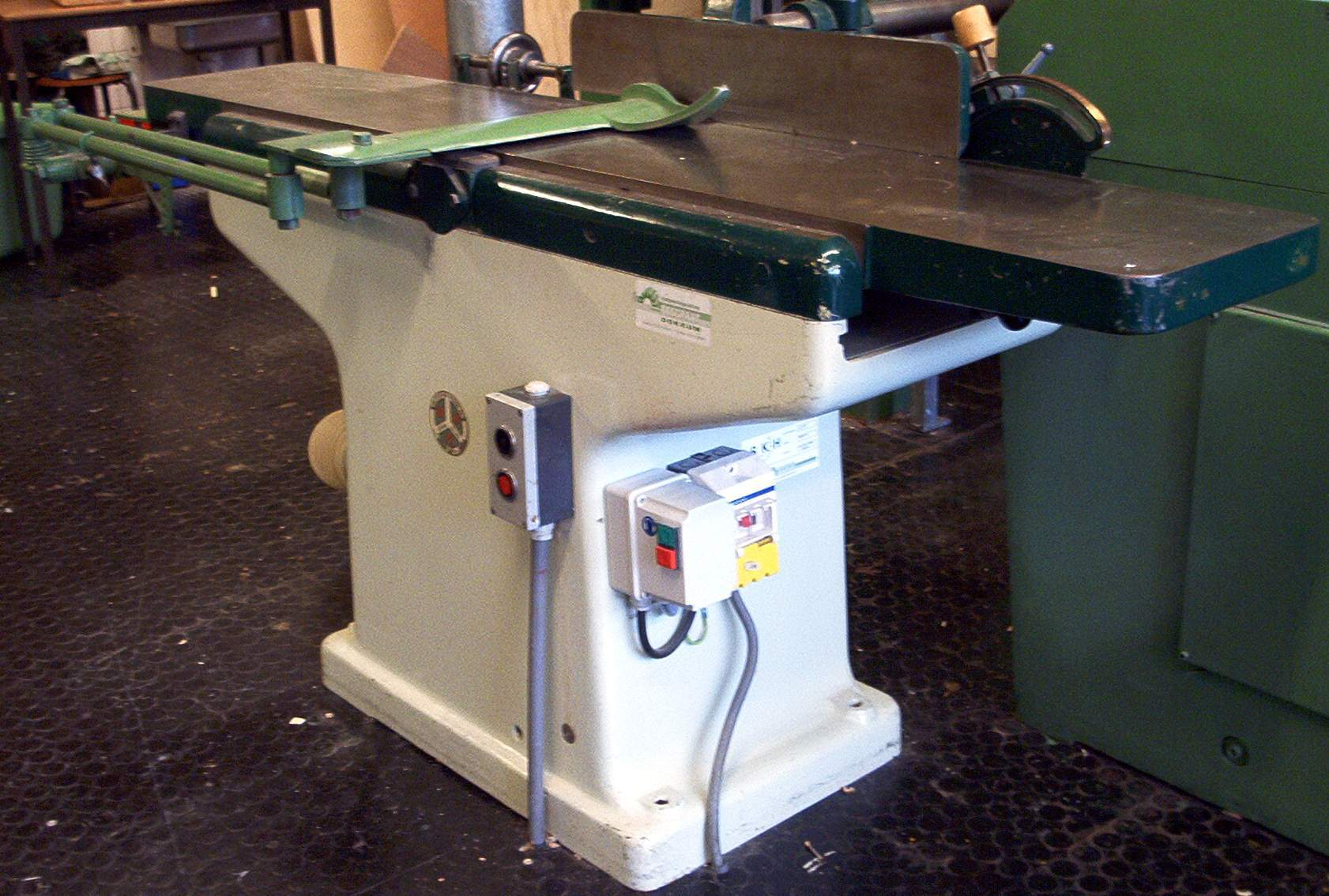 zelf gemaakte foto t.b.v. het publiek domein.Martink. Datum in megadata moet zijn 17 maart 2006 (camera verkeerd ingesteld).